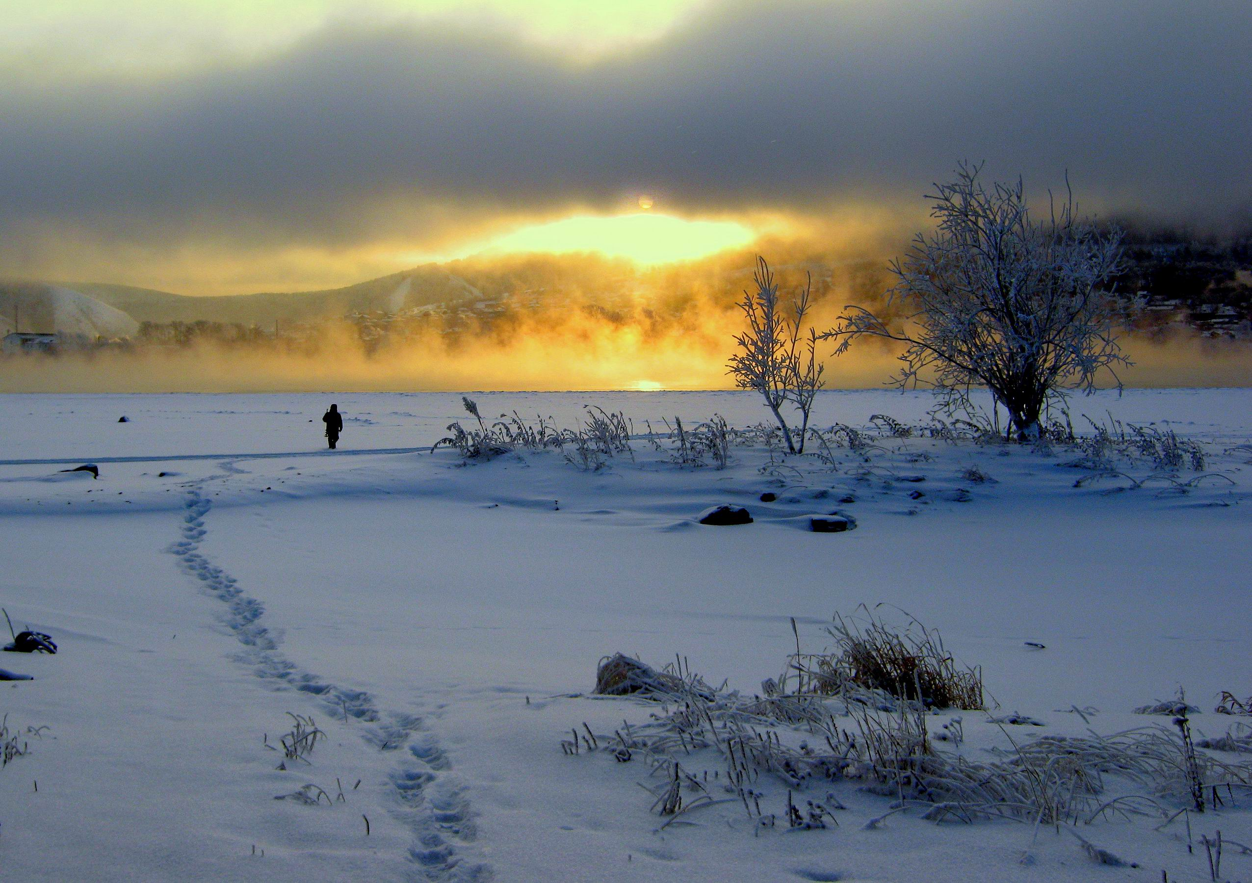 Oktyabrskiy rayon, Krasnoyarsk, Krasnoyarskiy kray, Russia